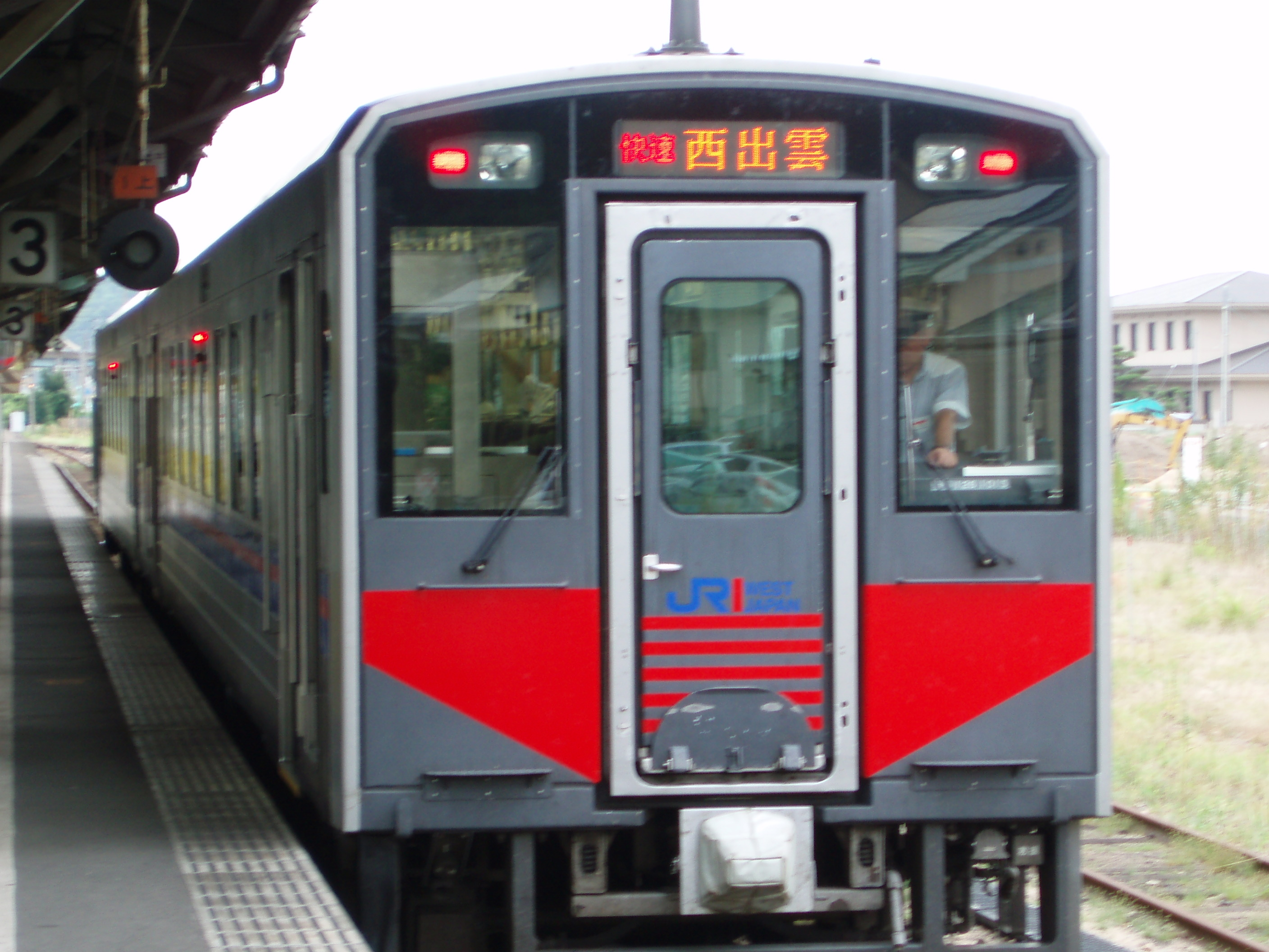 2006年8月22日、山陰本線倉吉駅にて停車中の3431D快速とっとりライナーを撮影した画像です。